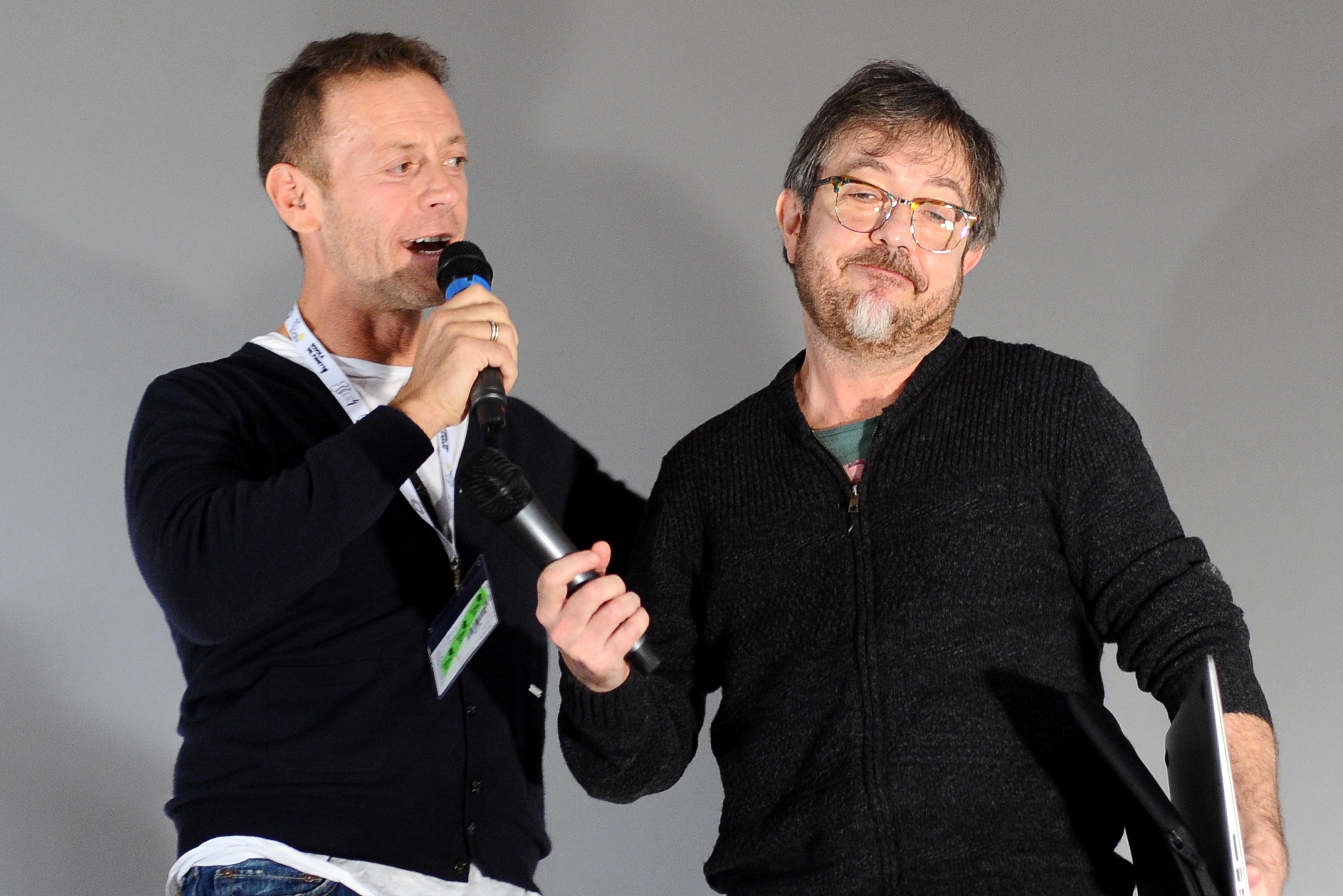 Rocco Siffredi e Rocco Tanica a Lucca Comics & Games 2016. Incontro "Rocco vs Rocco" al Cinema Astra.